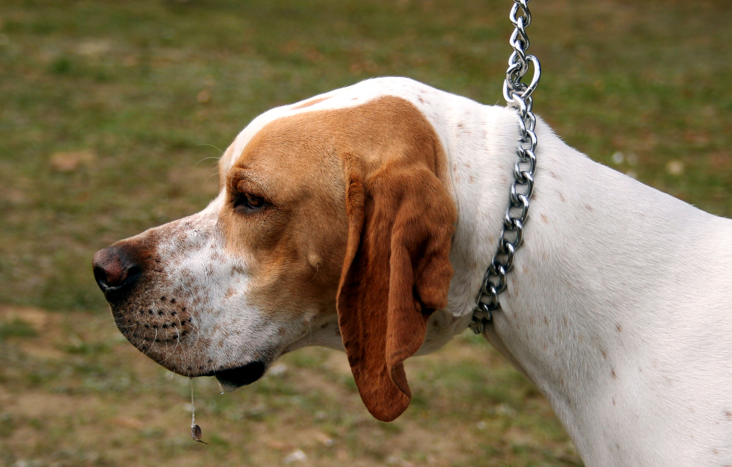 Pointer